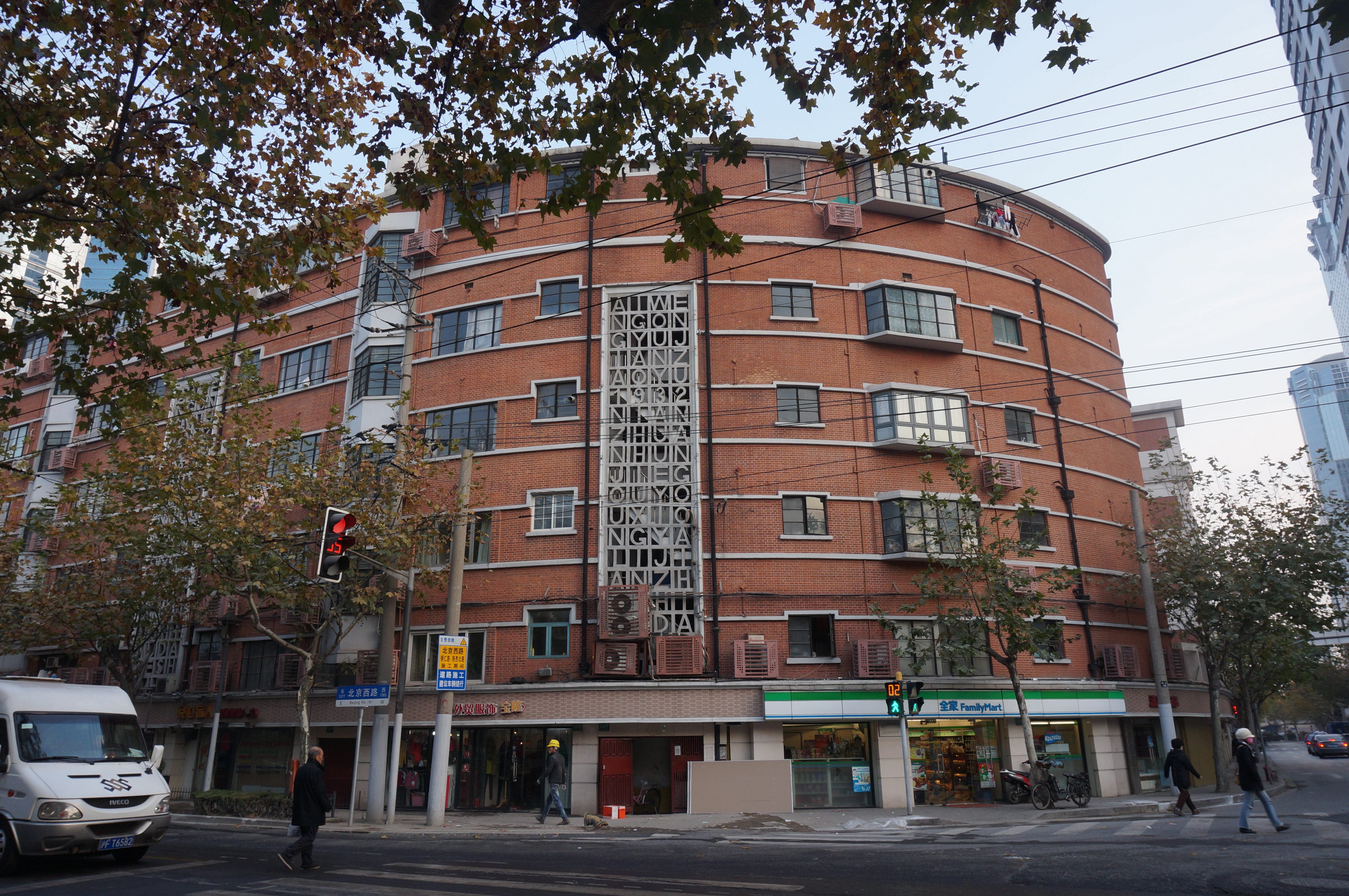 中文（中国大陆）: 上海市第三批优秀历史建筑——联华公寓